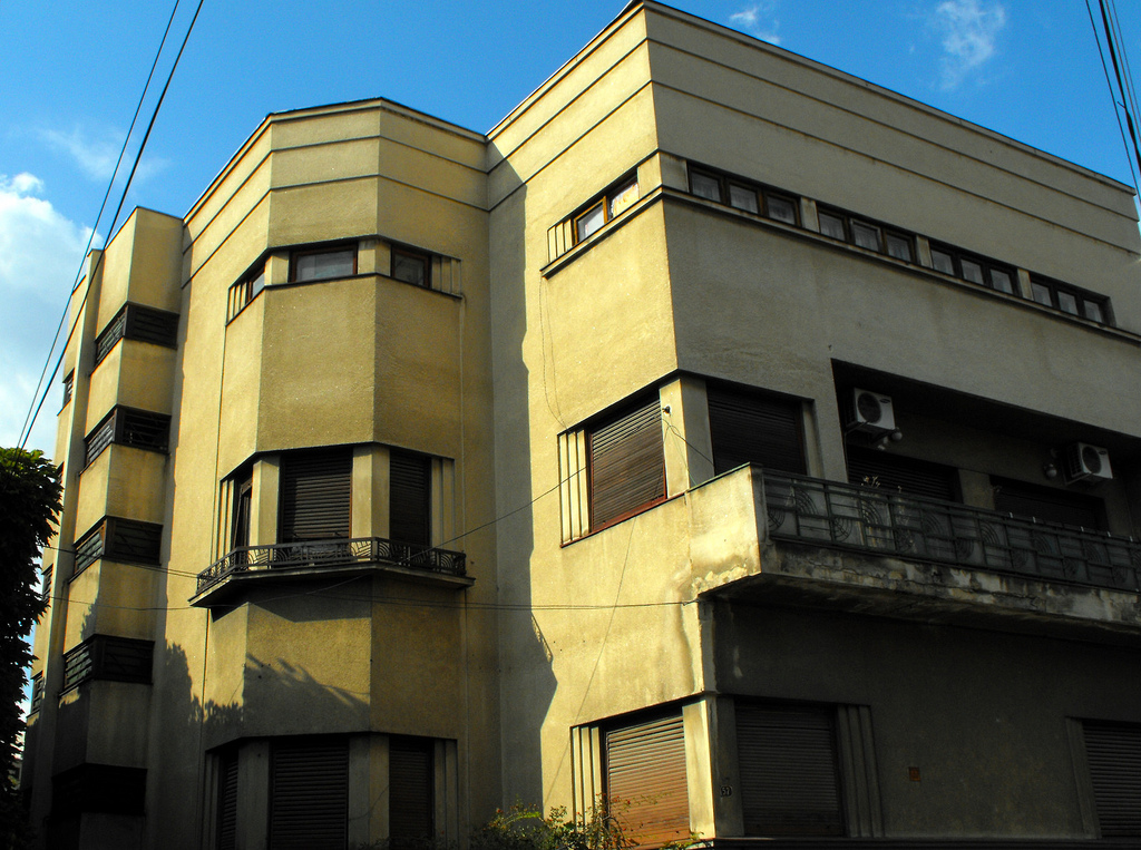 Icoanei 57